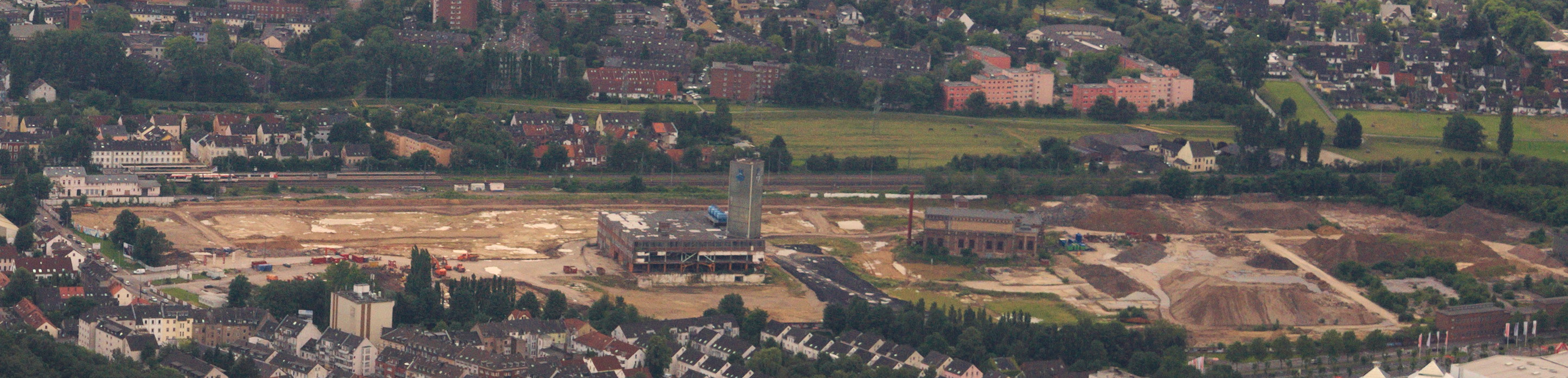 Ruine der Gerresheimer Glashütte in Düsseldorf. Links der Gerresheimer Bahnhof. Aufnahme von Norden; Luftbild aus ca. 600m Höhe über Grund